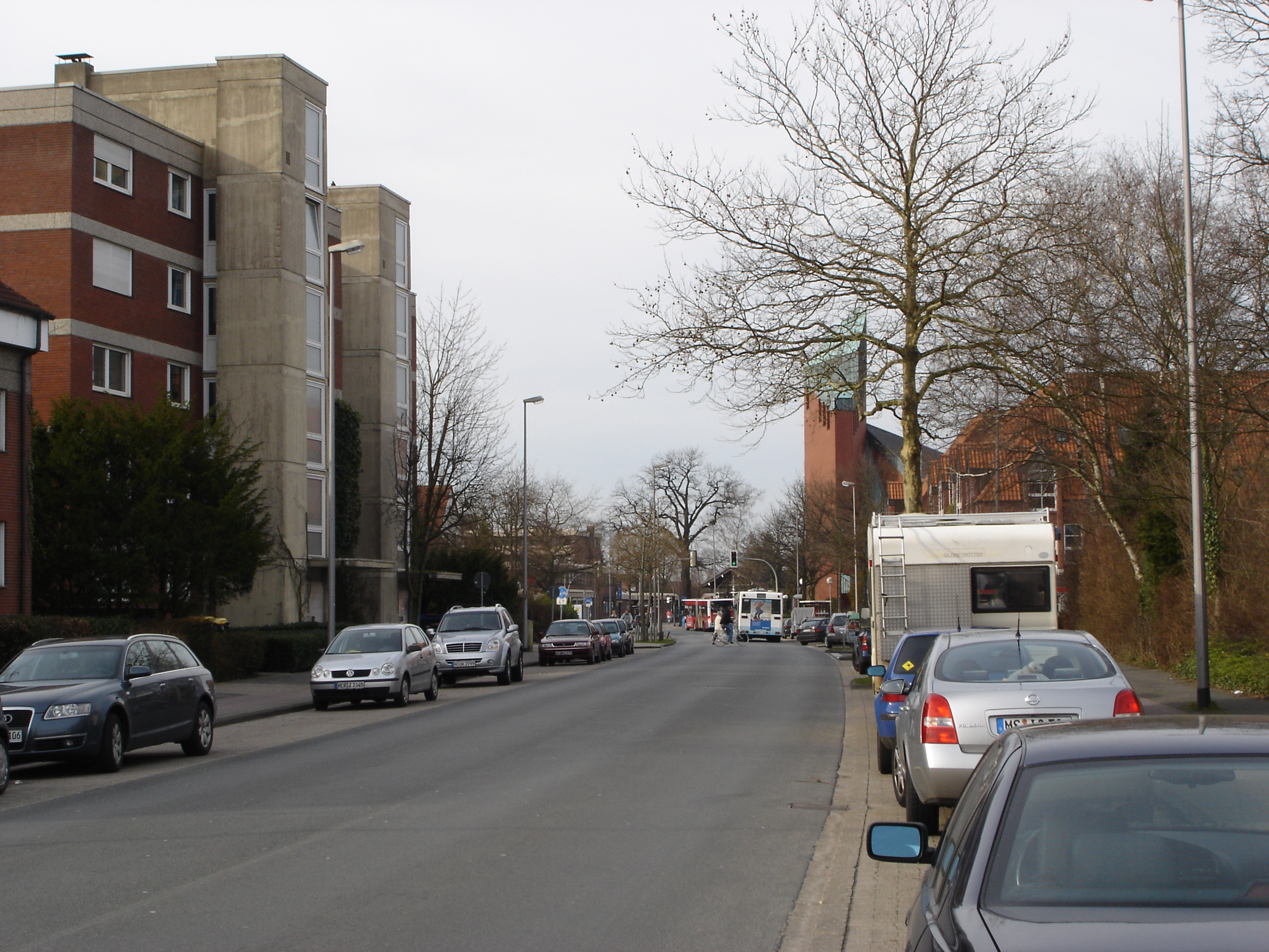 The Enschedeweg in the center of Gievenbeck, Münster, Germany